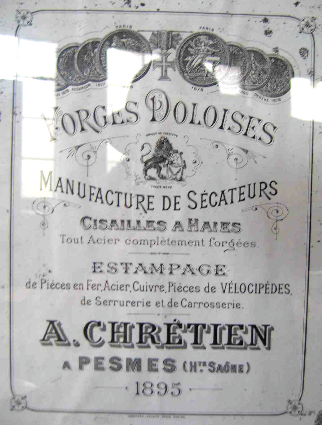 Forges de Pesmes, affiche des productions des Forges Dôloises - Pesmes - Haute-Sâone - France